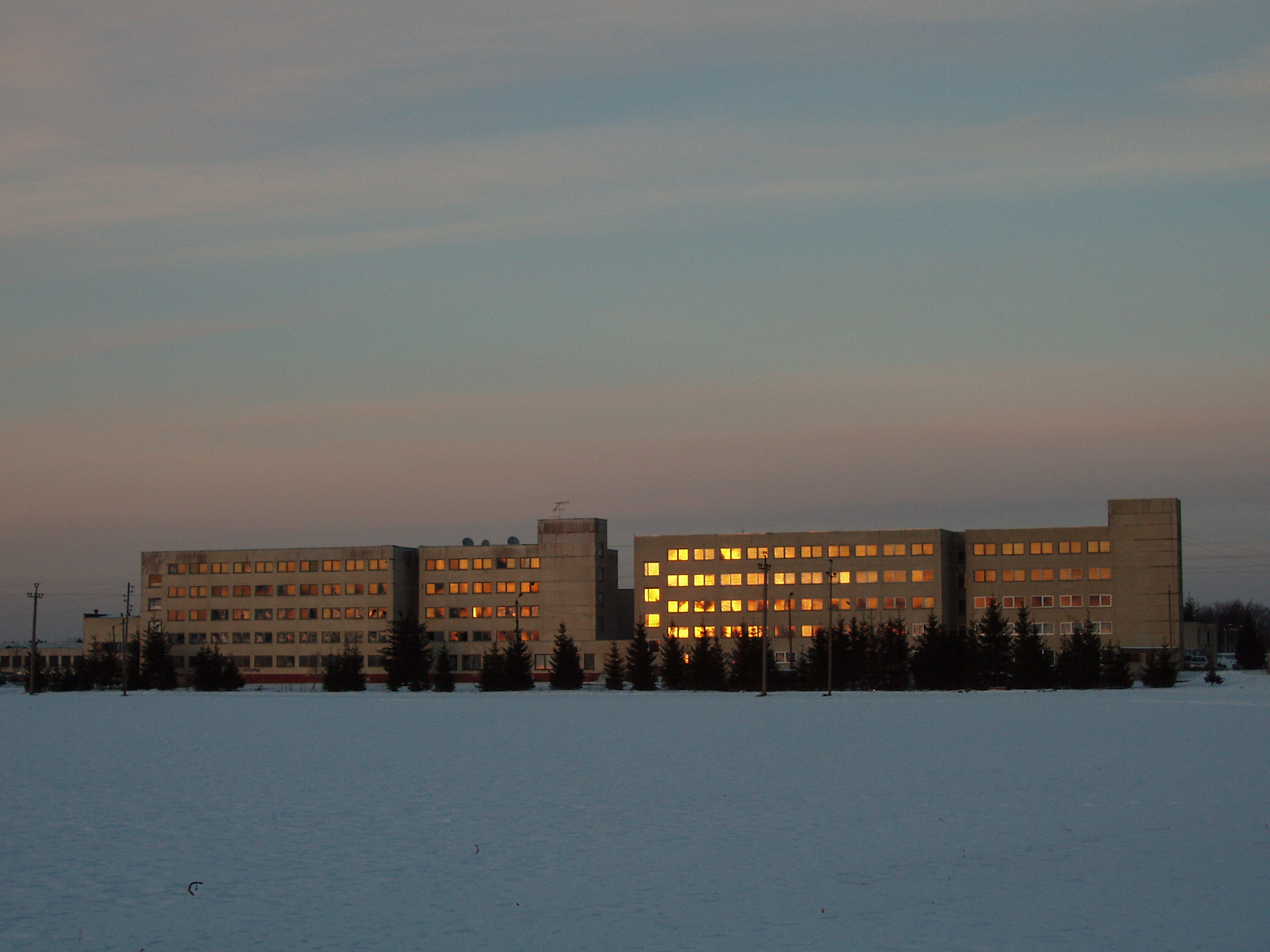 Pildil on Kose alevikus paiknev endise Kose kutsekooli hoone.